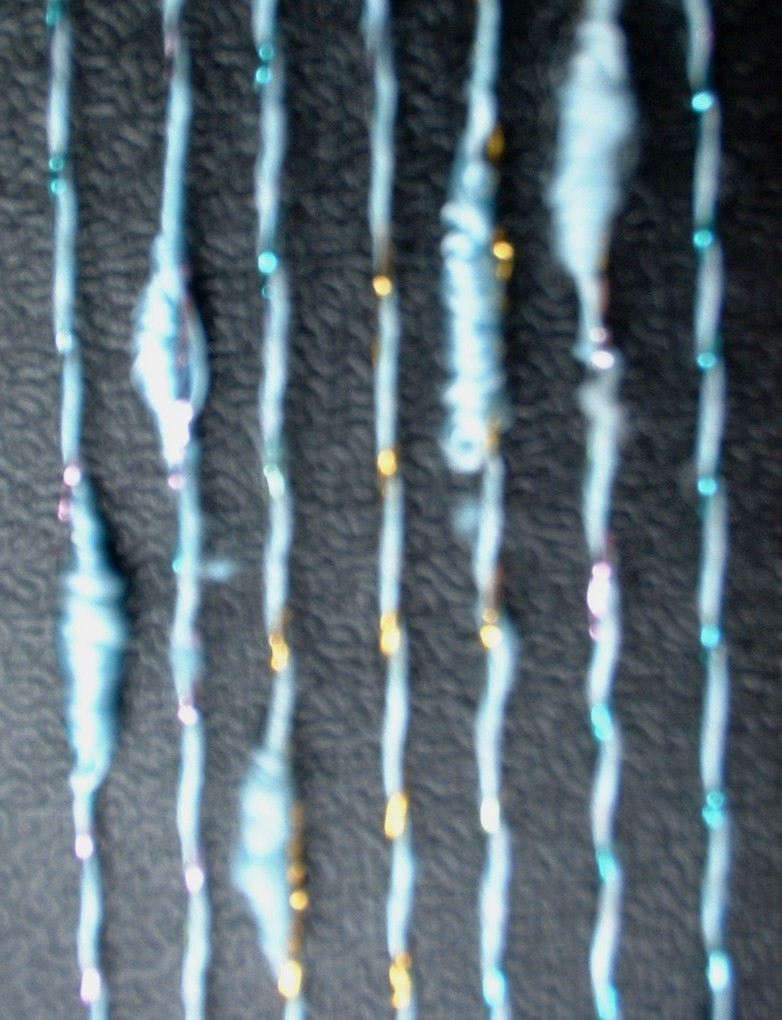 Effektgarn umzwirnt mit Metallfaden